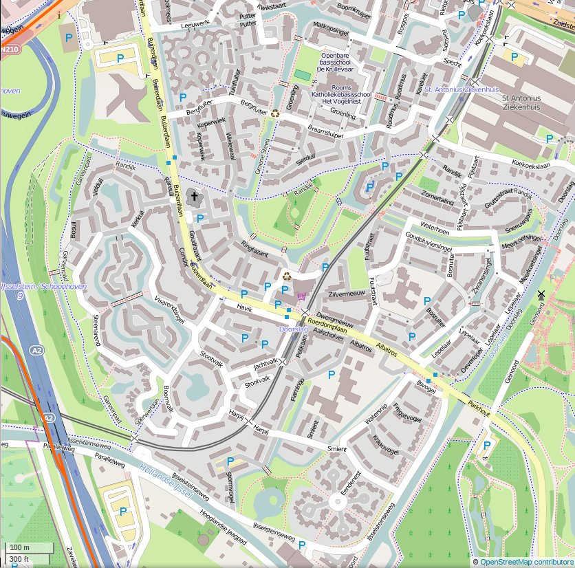 Voorbeeld bloemkoolwijk